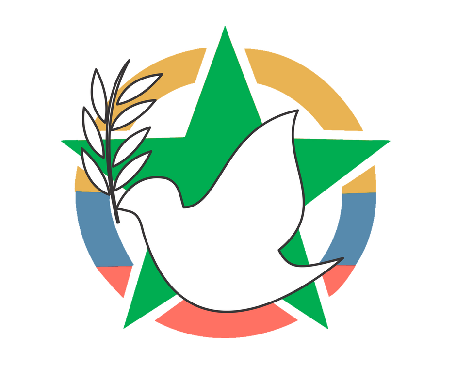 Oficiala bildo de Kolombia Esperantista Junulara Organizo